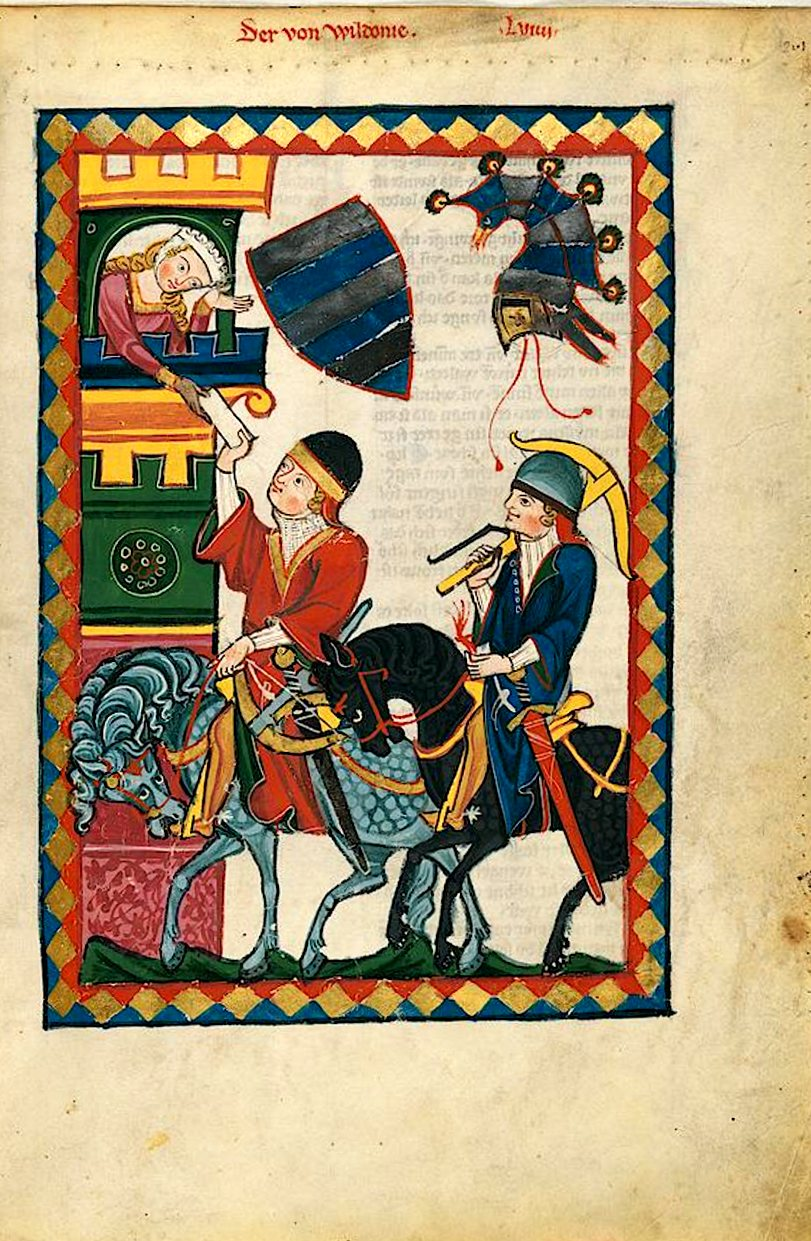 Herrand II. von Wildon und Frau Perchta war eine Tochter Ulrichs von Lichtenstein. Miniatur. Große Heidelberger Liederhandschrift (Codex Manesse)